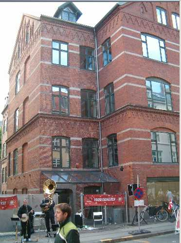 Dansk Sløjdlærerskoles bygning i over 100 år, Værnedamsvej 13, København.